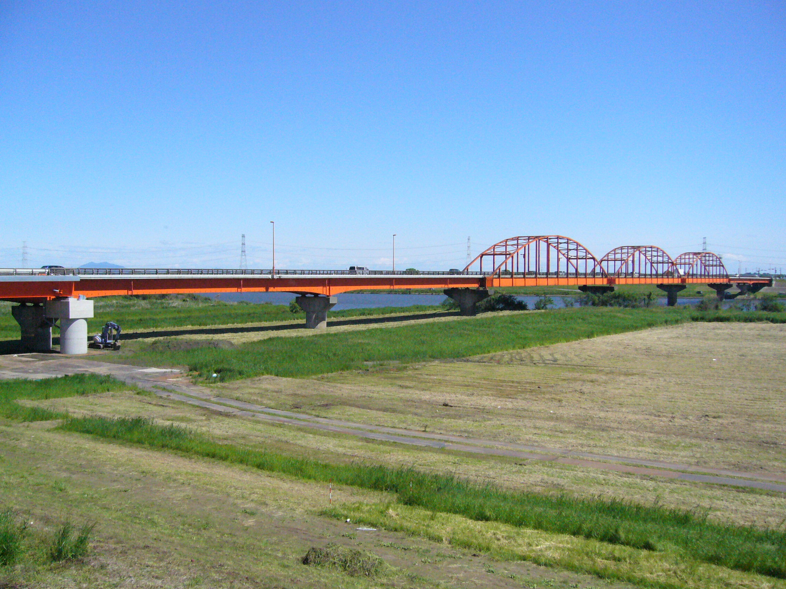 nagatoyo-bridge,narita-city,japan